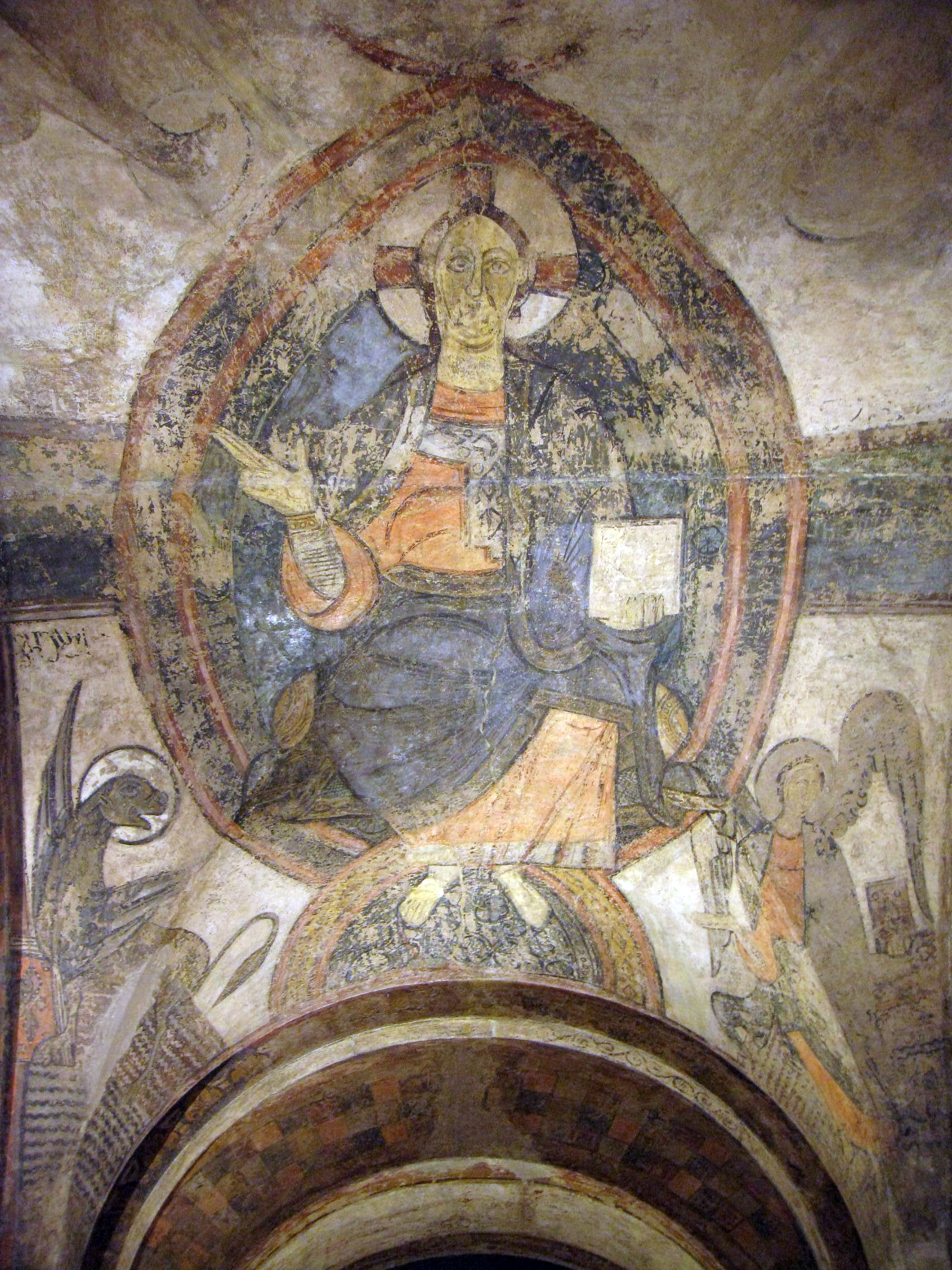 Palau Nacional (Barcelona)